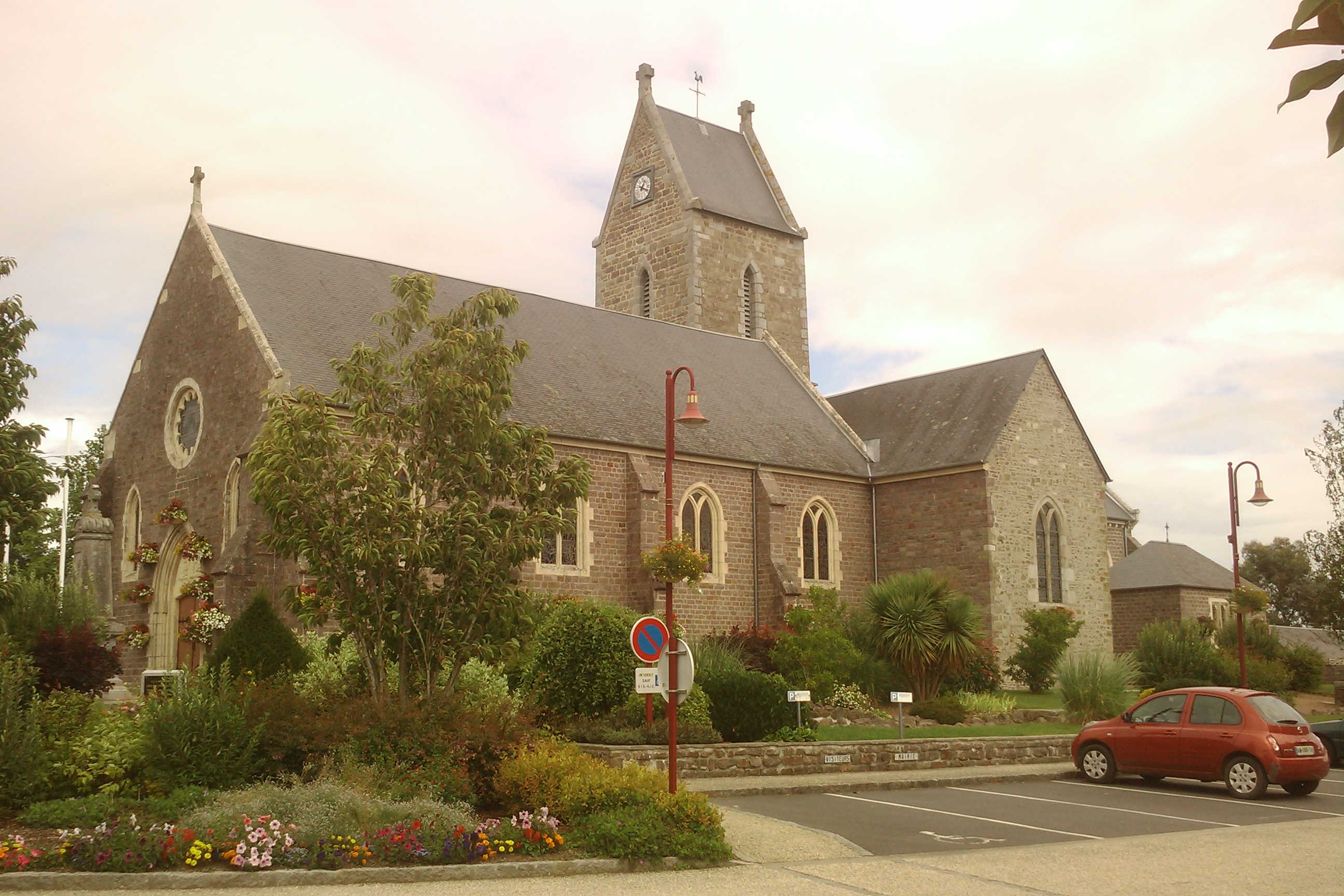 Église Saint-Germain de Moyon